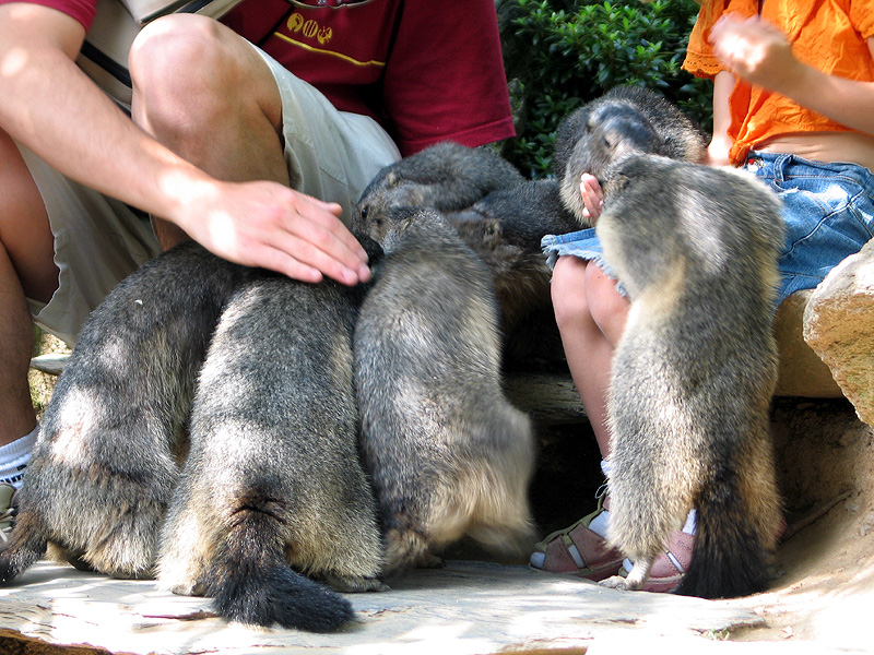 "Parc animalier des Pyrénées", France - marmots